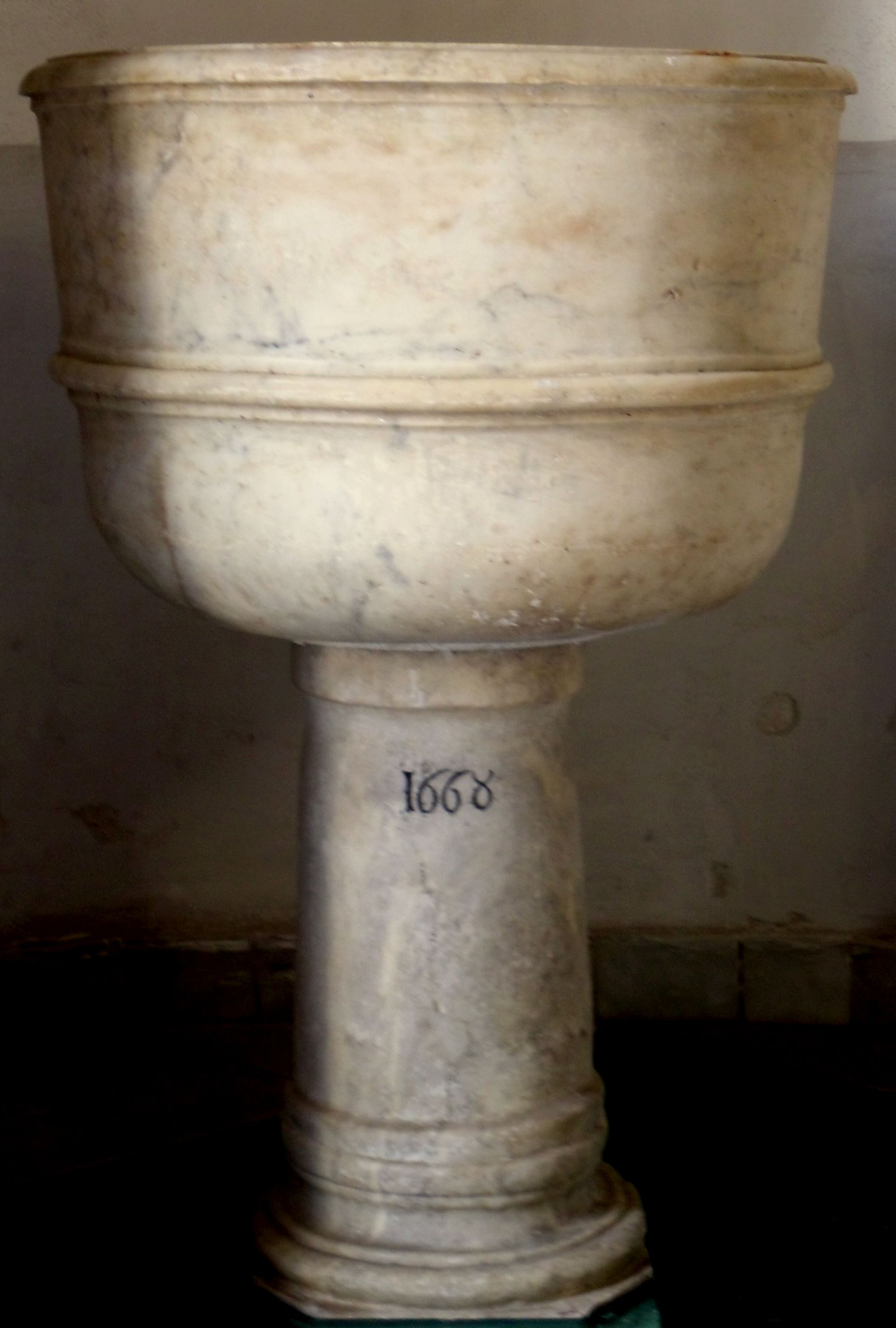 Navata sinistra. Fonte battesimale datato 1668.